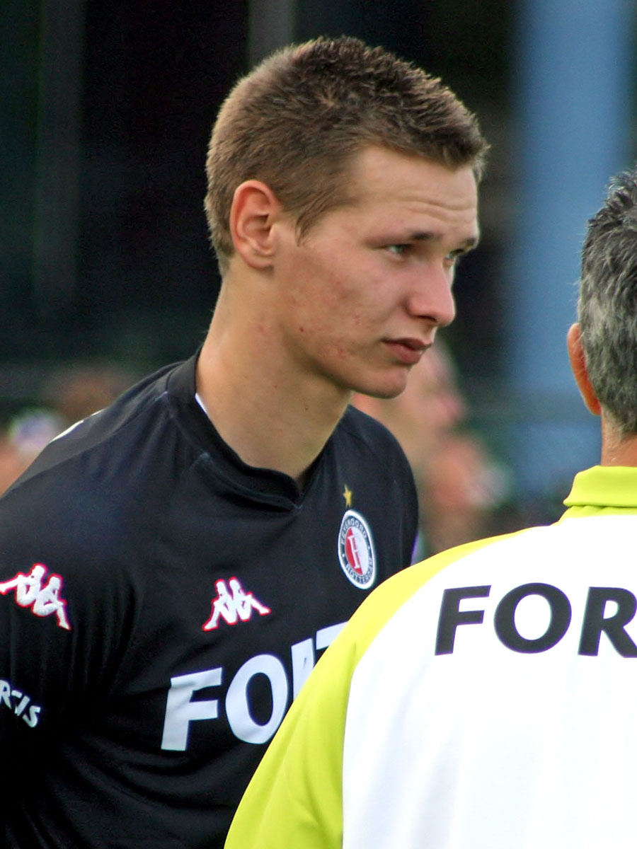 Erwin Mulder (Feyenoord)